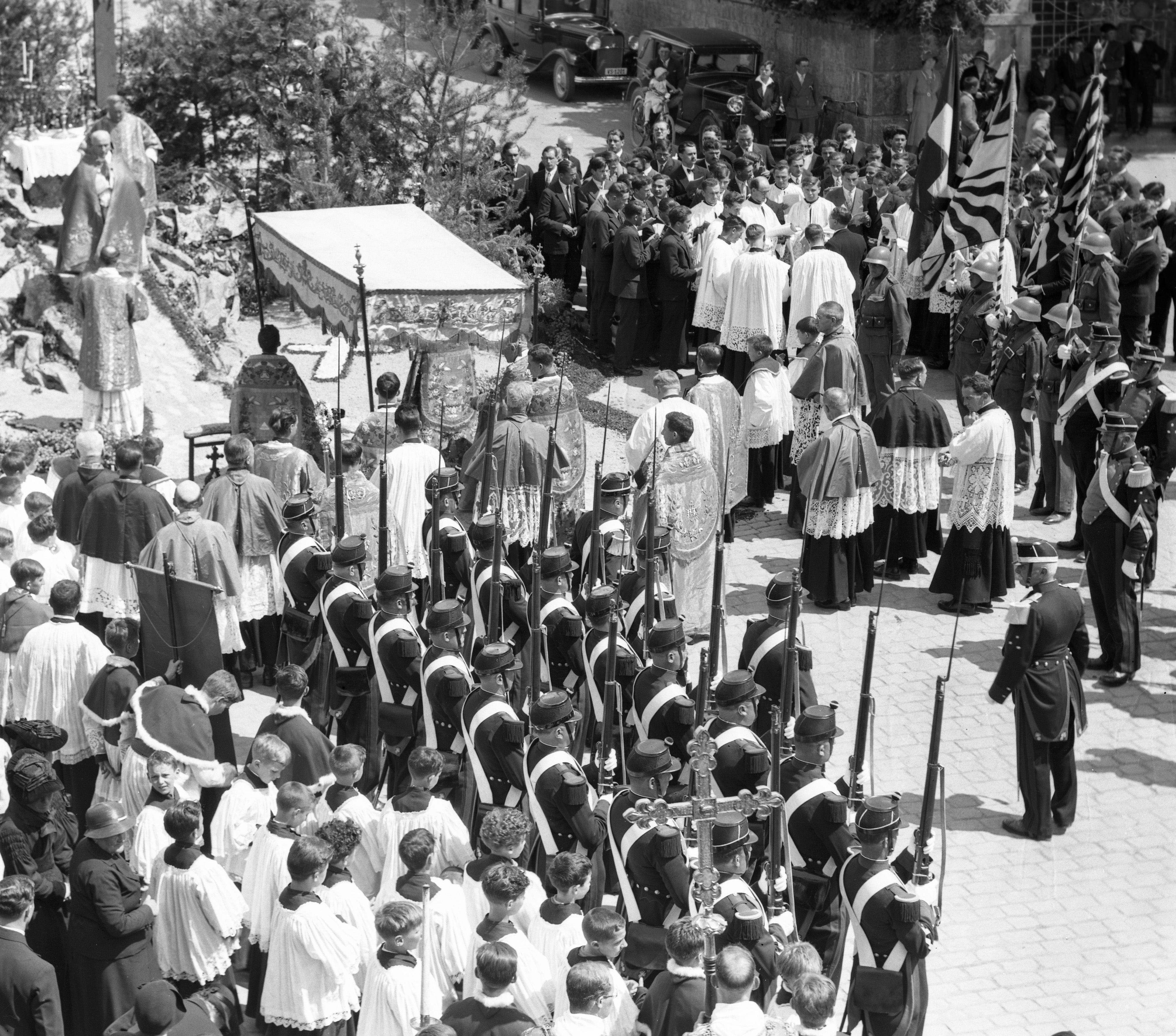 Peloton d'honneur de la gendarmerie valaisanne à la procession de la Fête-Dieu dans les rues de Sion en 1933. Les gendarmes sont armés de fusils Vetterli mod. 1881